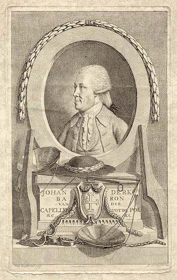 Portret van Joan Derk van der Capellen tot den Pol, nb de naam op de gravure is alternatief gespeld "Johan Derk Baron van der Capellen tot de Pol"